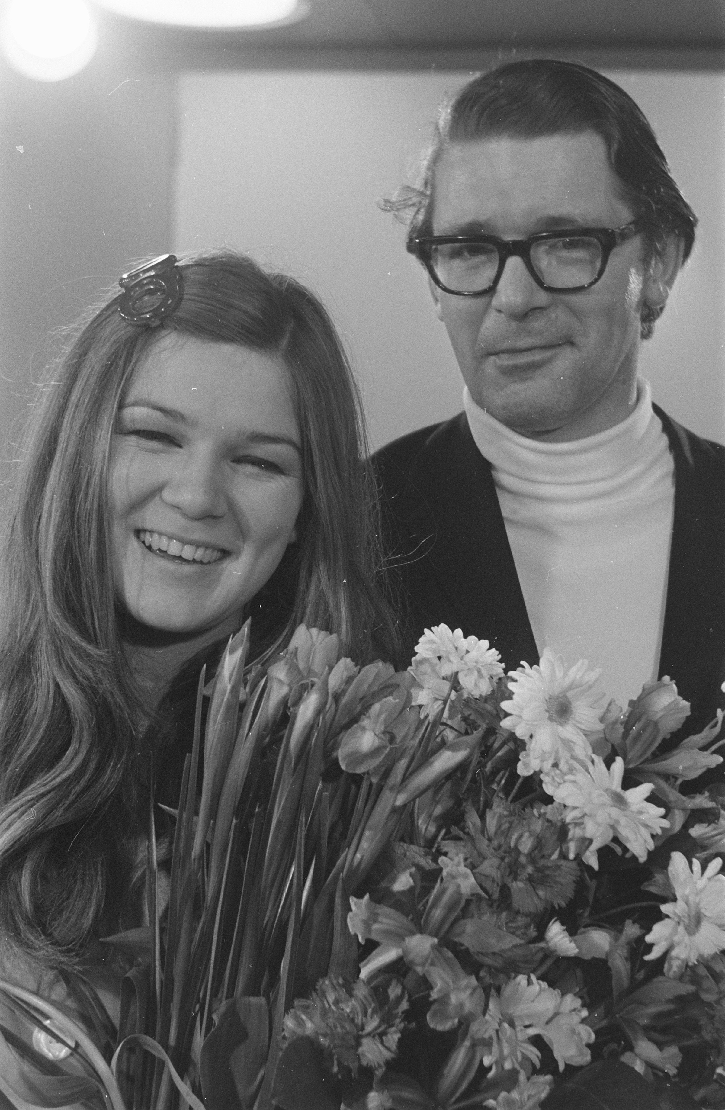 Collectie / Archief : Fotocollectie Anefo Reportage / Serie : [ onbekend ] Beschrijving : Lenny Kuhr arriveert op Schiphol, na op het Eurovisie Songfestival met drie andere deelnemers op de 1e plaats geëindigd te zijn in Madrid, nr. 10 : Lenny met David Hartsema Datum : 30 maart 1969 Locatie : Noord-Holland, Schiphol Trefwoorden : SONGFESTIVALS, deelnemers Persoonsnaam : Hartsema, David, Kuhr, Lenny Fotograaf : Evers, Joost / Anefo Auteursrechthebbende : Nationaal Archief Materiaalsoort : Negatief (zwart/wit) Nummer archiefinventaris : bekijk toegang 2.24.01.05 Bestanddeelnummer : 922-2482